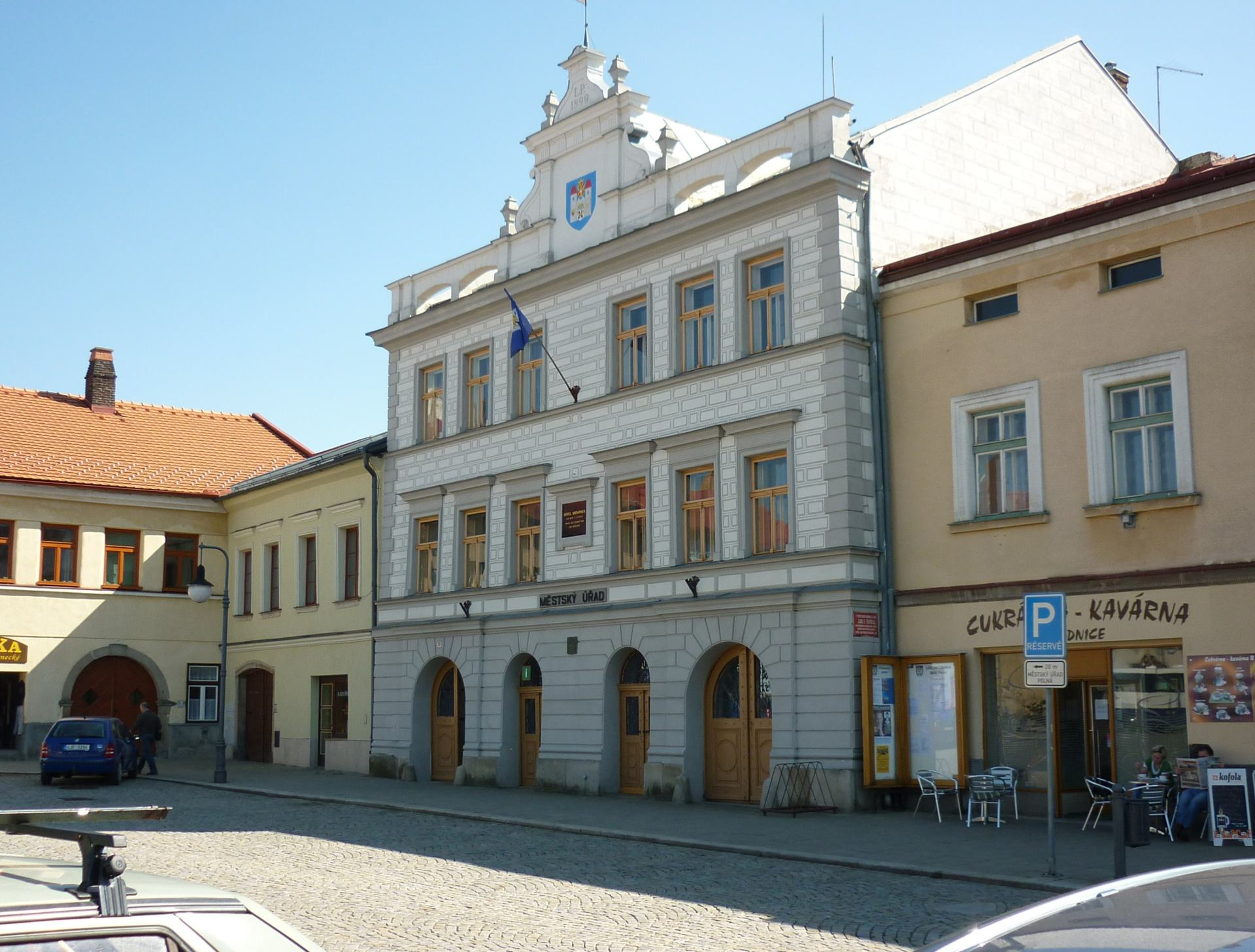 Polná - náměstí a pamětihodnosti